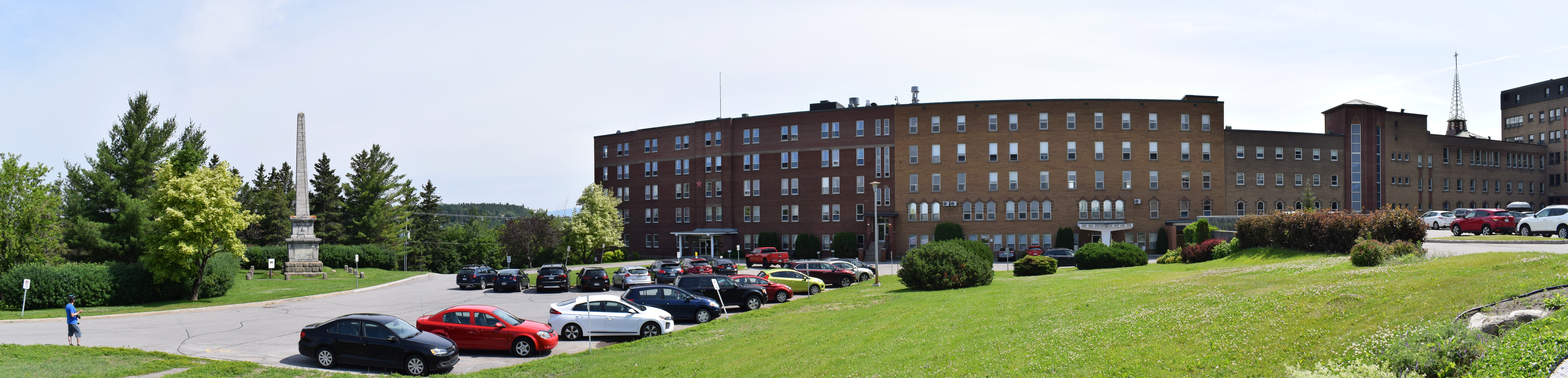 Site du patrimoine du Monastère-des-Augustines-de-la-Miséricorde-de-Jésus-et-du-Monument-Price à Chicoutimi, Quebec